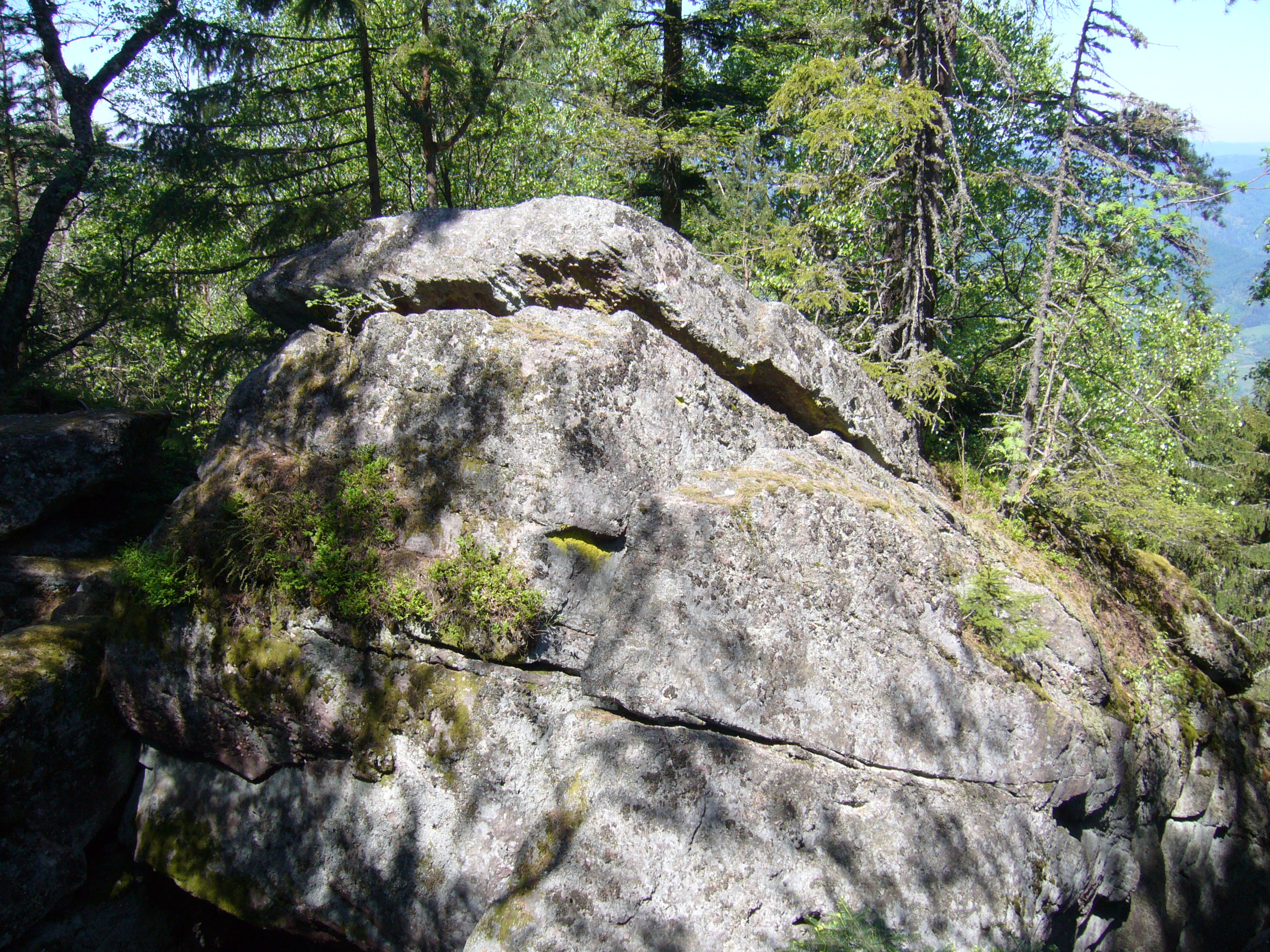 Taennchel 173.JPG